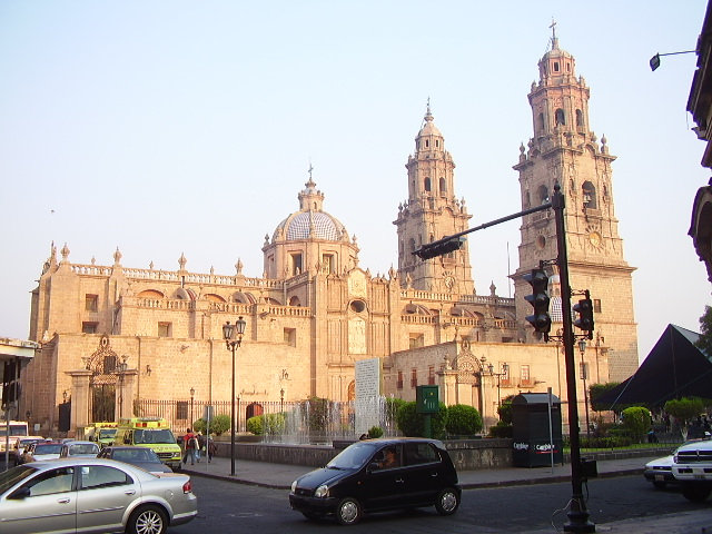 La imponente catedral de Morelia en el centro histórico de la capital del estado.